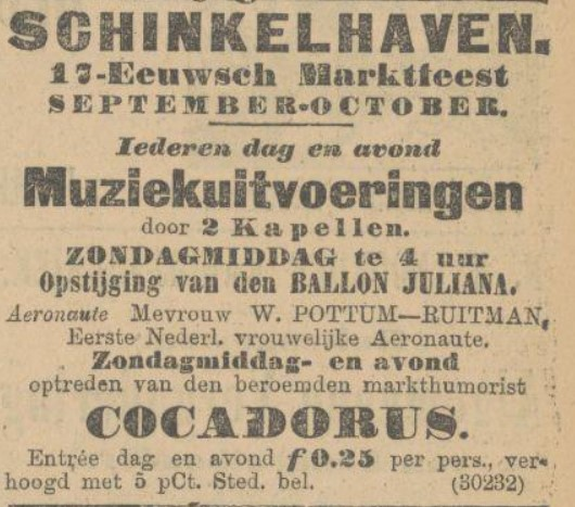 Advertentie voor de ballonvlucht van mw Pottum-Ruitman van 1909 (die niet plaatsvond)